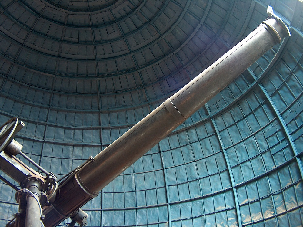 Observatoire de Paris : téléscope à l'intérieur de la grande coupole .